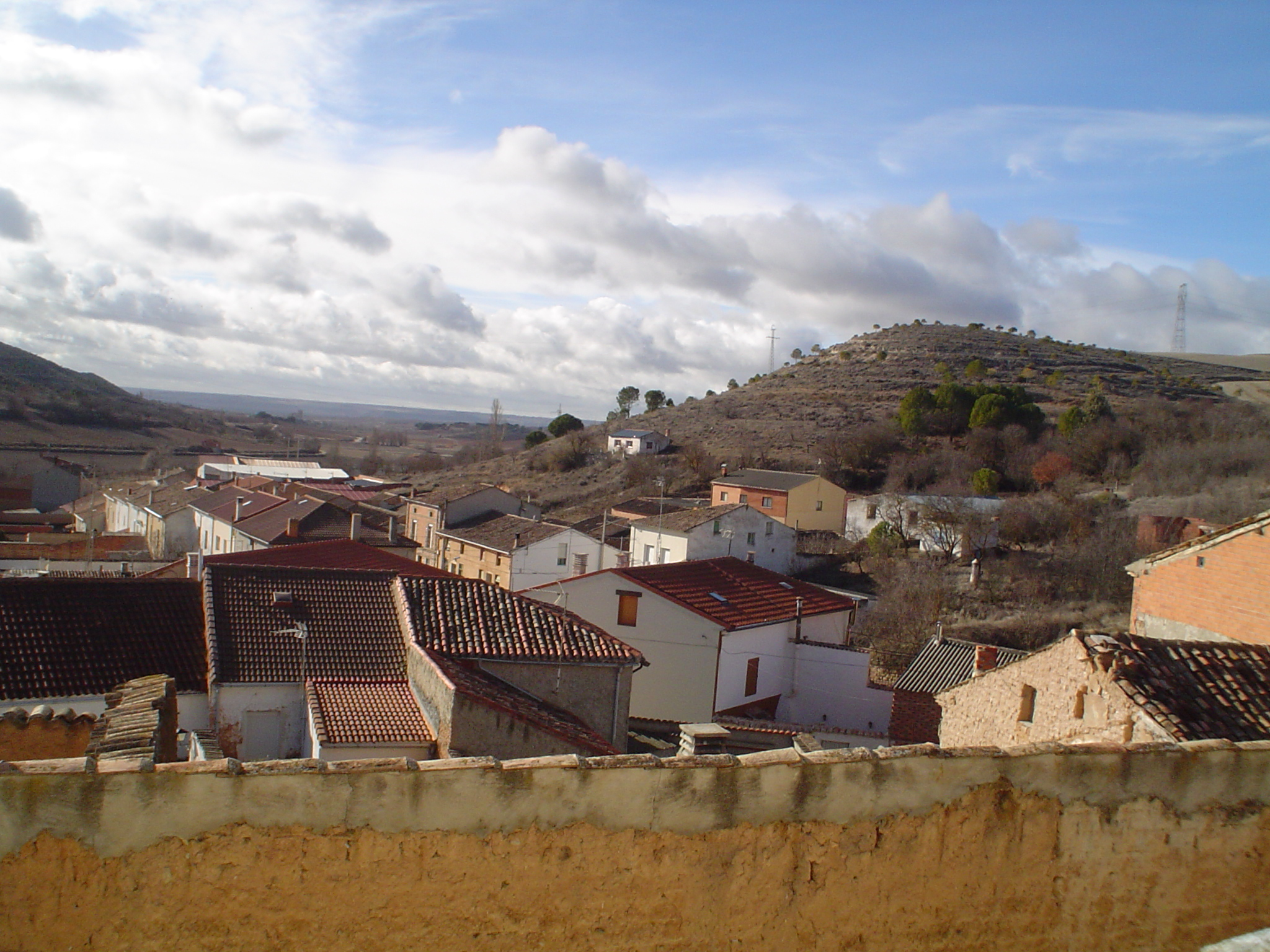 Vista del pueblo de Piñel de Arriba (Valladolid) desde el atrio de su iglesia.